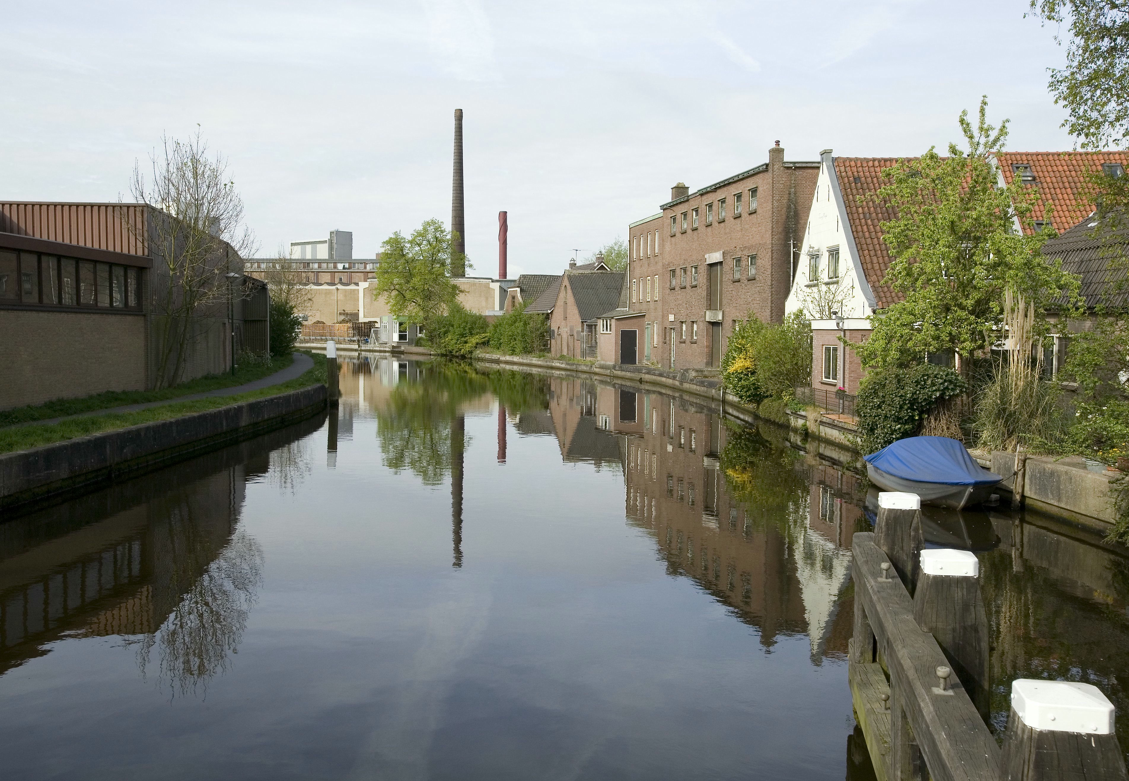 N.V. Woerdensche Dakpannen - En Steenfabrieken: Zicht op het fabriekscomplex met schoorstenen, gezien vanaf brug over de Oude Rijn aan de Jozef Israëllaan